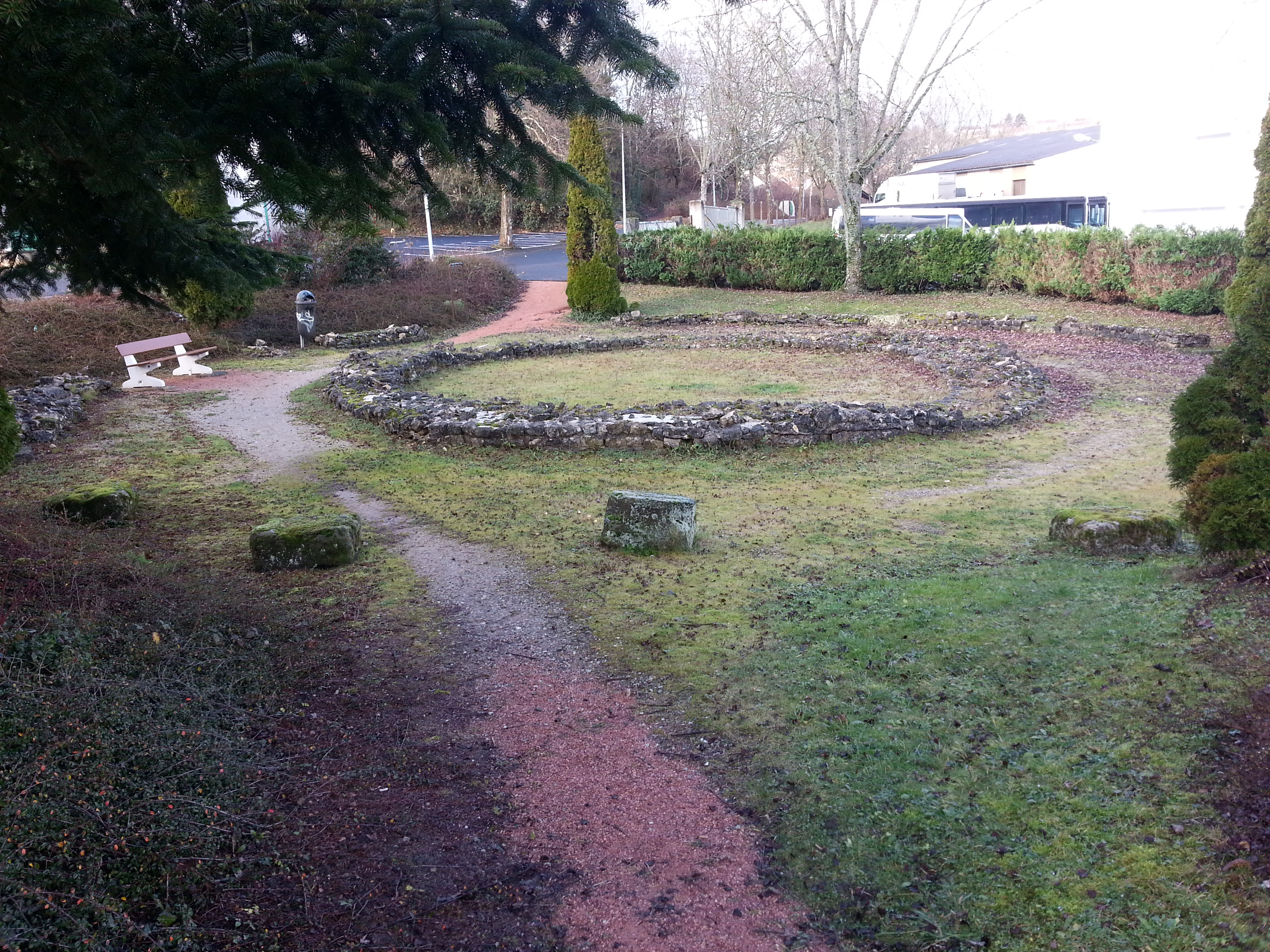 Fanum d'Aron à Aurillac ( Cantal )